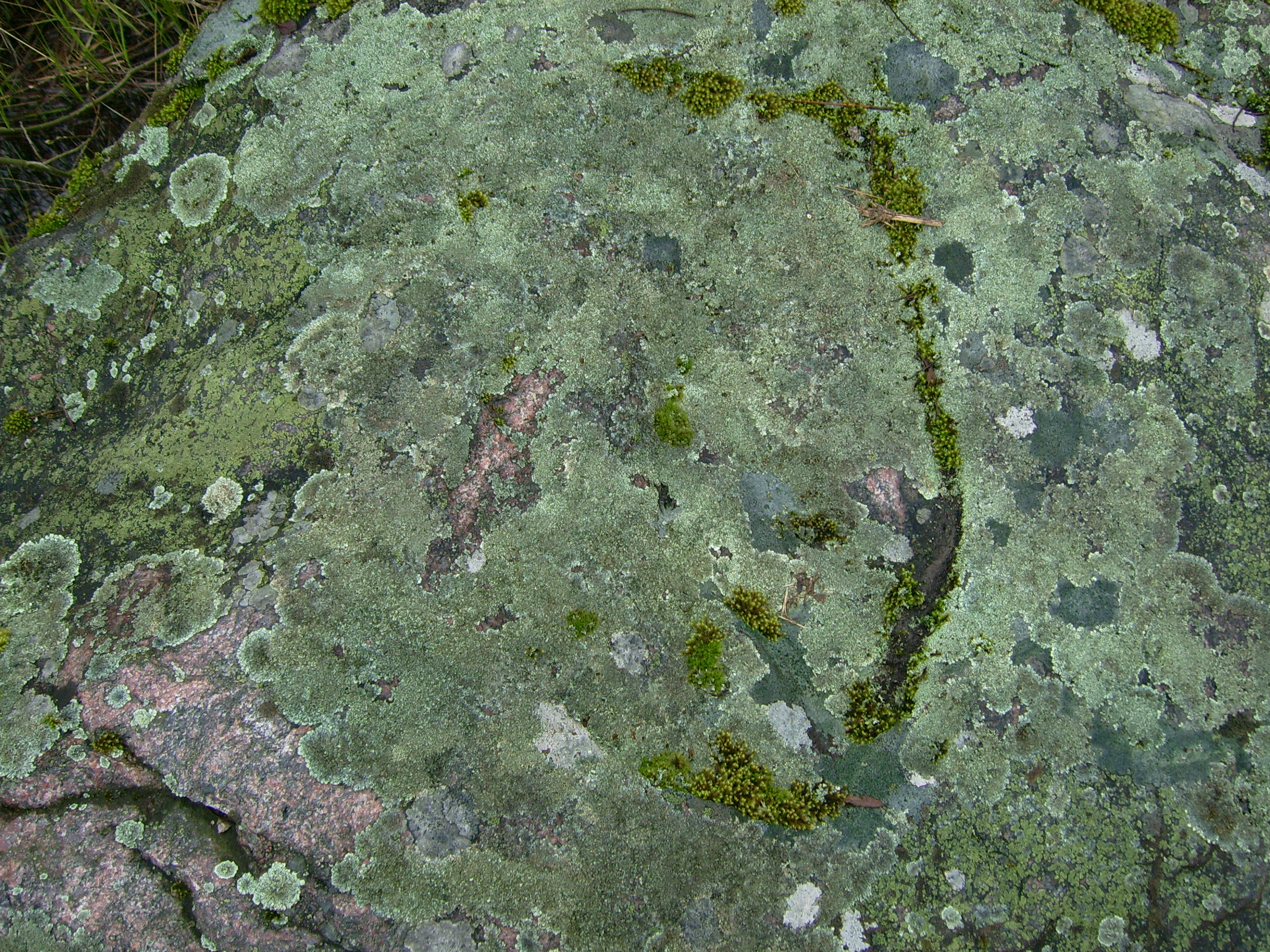 Tamošaičių akmuo